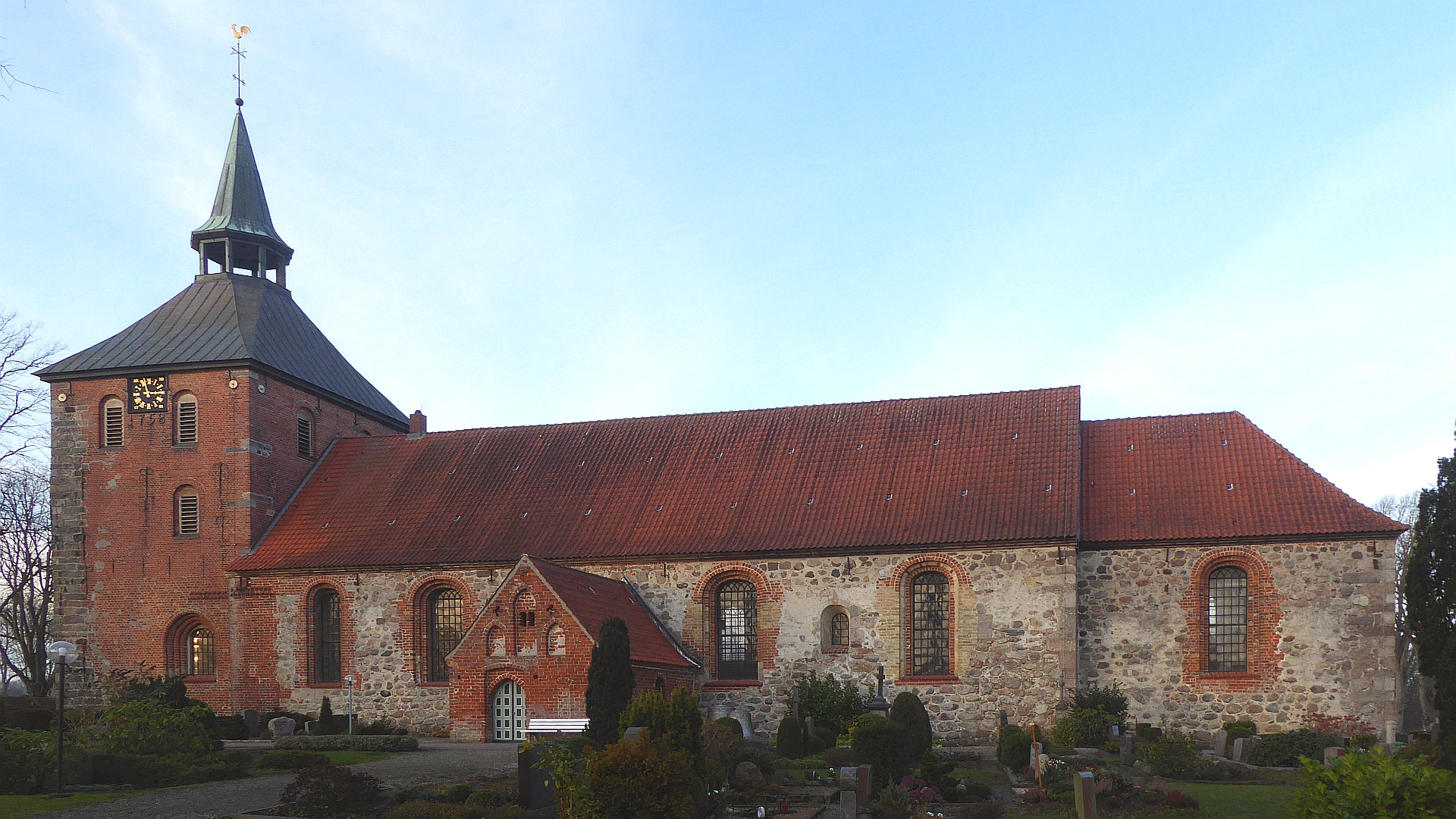 Grundhof Marienkirche spätromanische Feldsteinkircheirche 12 Jh mit spätgotischem Turm in Mischmauerwerk - Foto 2018 Wolfgang Pehlemann P1280581